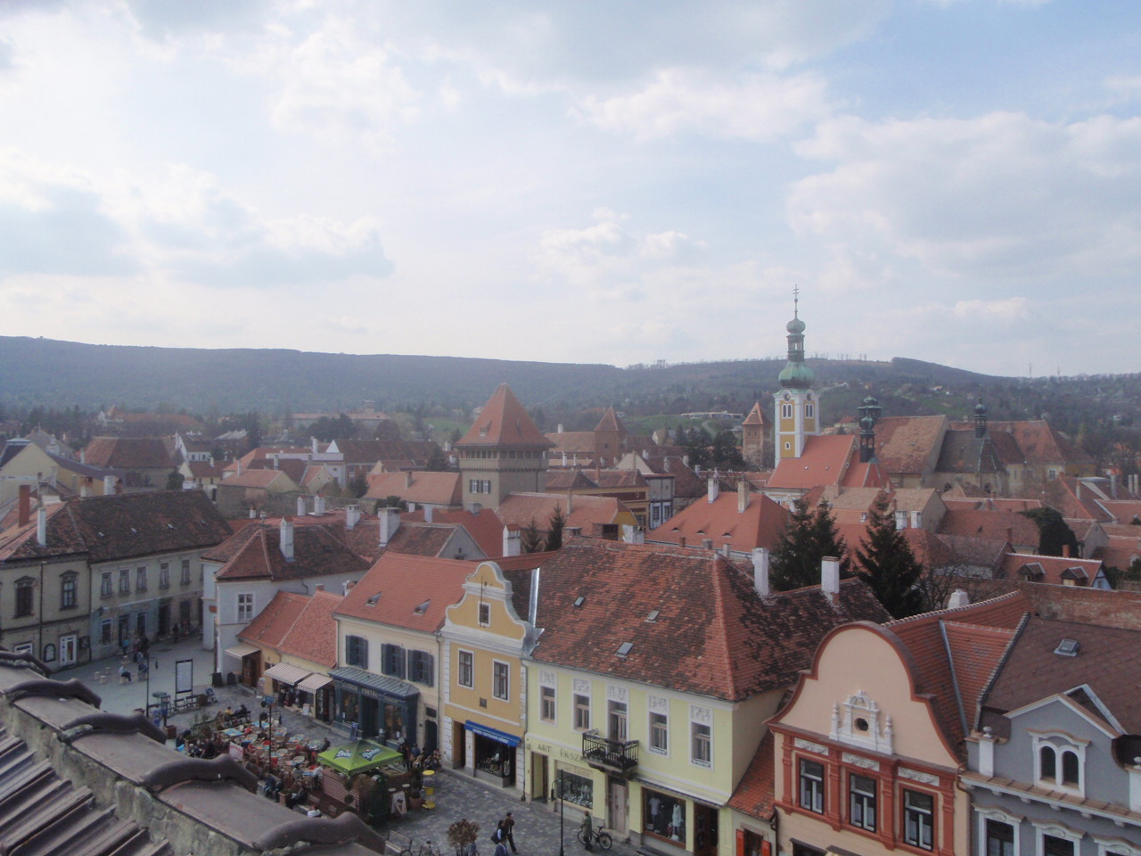 Innenstadt von Köszeg